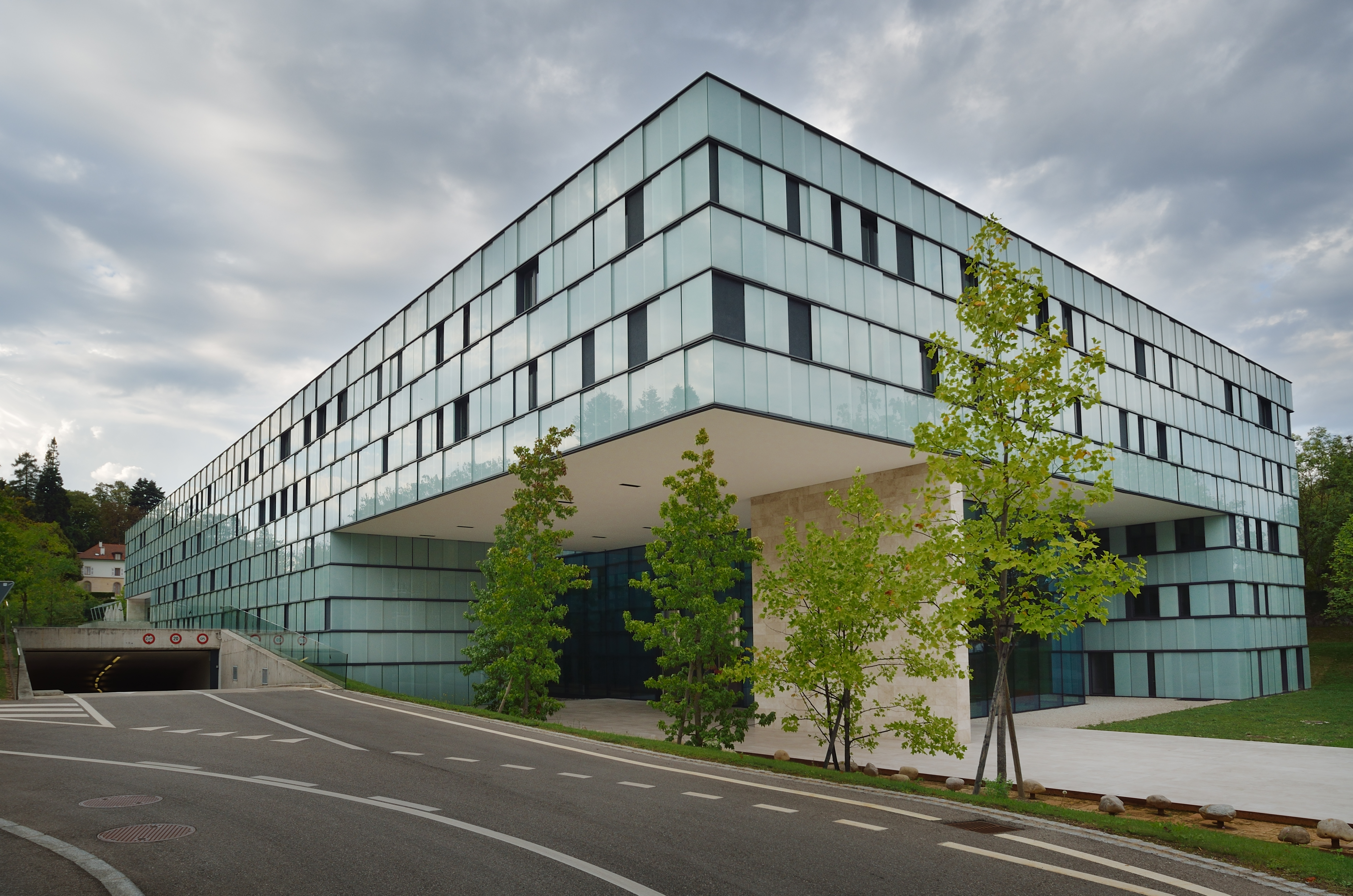 Organisation mondiale de la santé (Genève, Suisse)